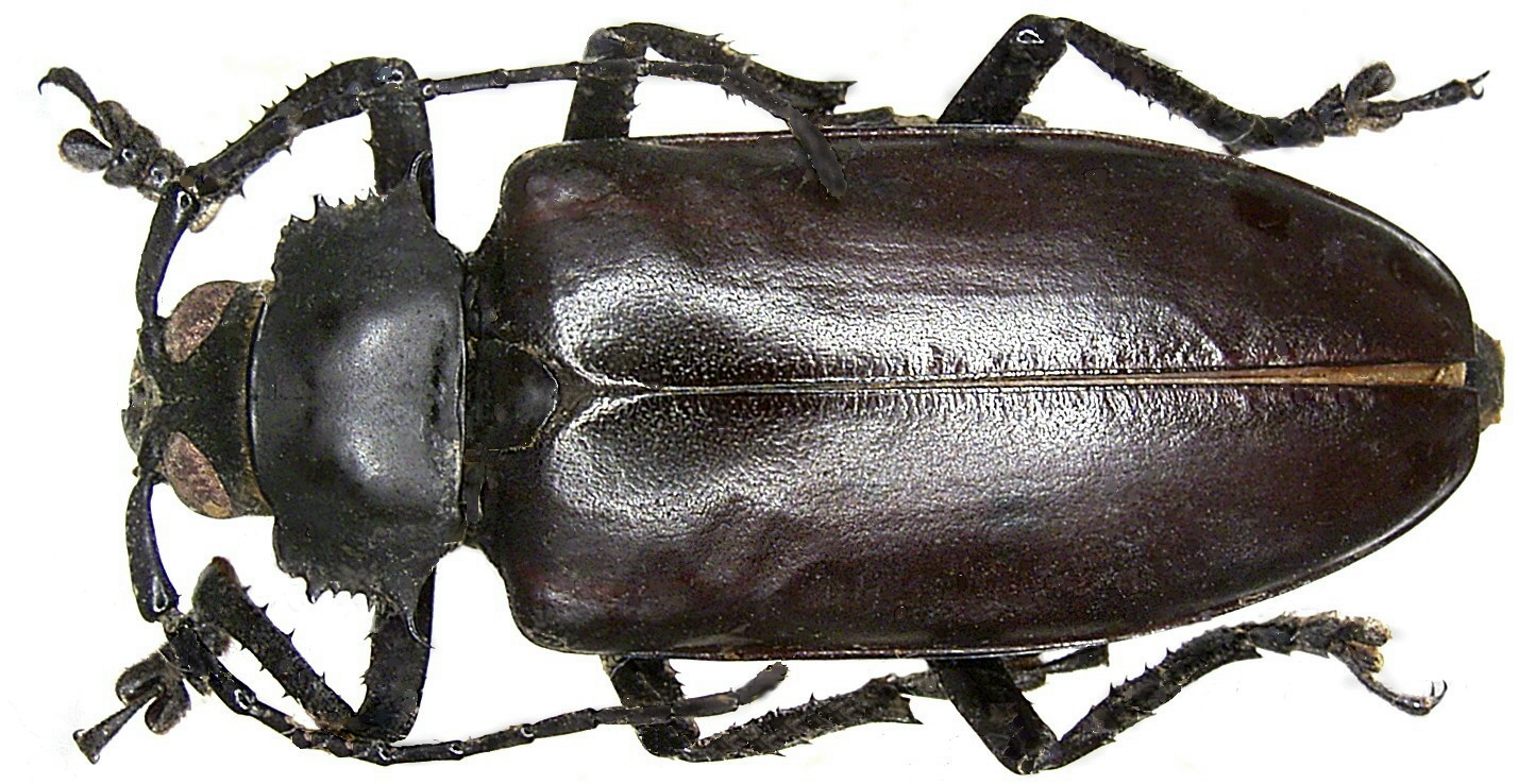 Familie: Cerambycidae Grösse: 43 mm Fundort: Vietnam, Yen Bai Prov., An Fu Country leg. 1996; det. A.Weigel Foto: U.Schmidt, 2006